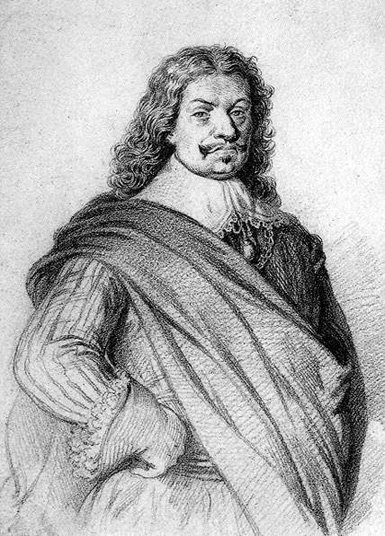 Raimondo dei conti di Montecuccoli